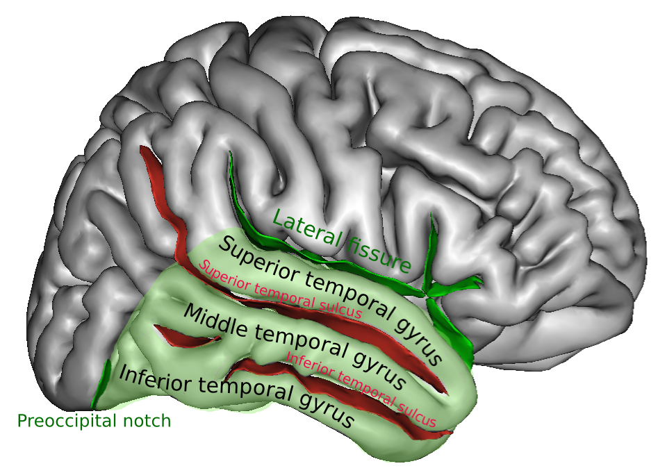 Temporal lobe, gyri and sulci.